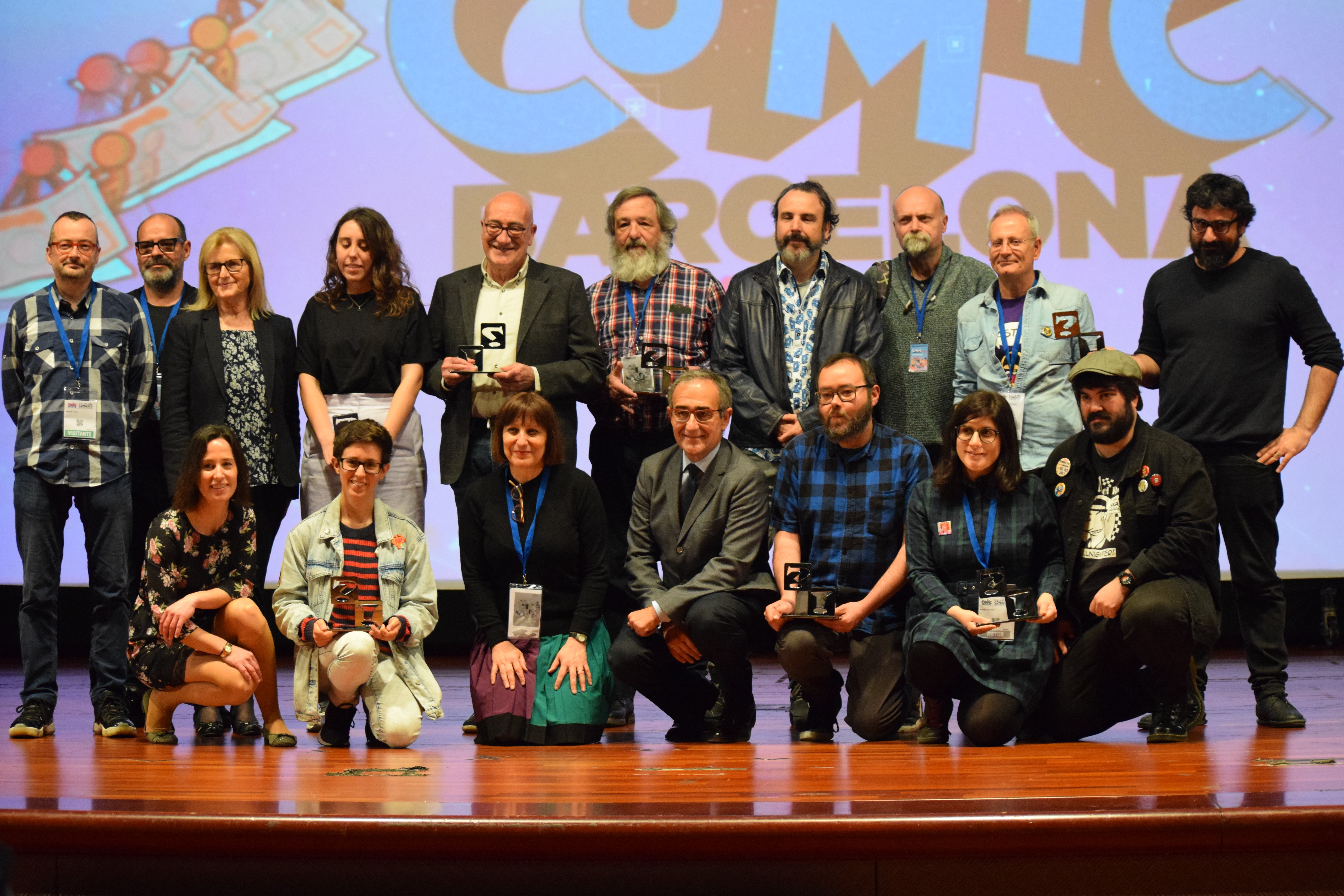 Foto de grup de tots els autors guardonats al 37. Comic Barcelona. A dalt d'esquerra a dreta: x, Rosa Laparra, María Medem, Antonio Altarriba, x, x, Antoni Gurial, Angel de la Calle, x. A baix d'esquerra a dreta: Meritxell Puig, Lourdes Navarro, Laura Pérez Vernetti, Patrici Tixis, Albert Monteys, dos membres del fanzine valencià Saxífono. 37. Comic Barcelona, 2019.